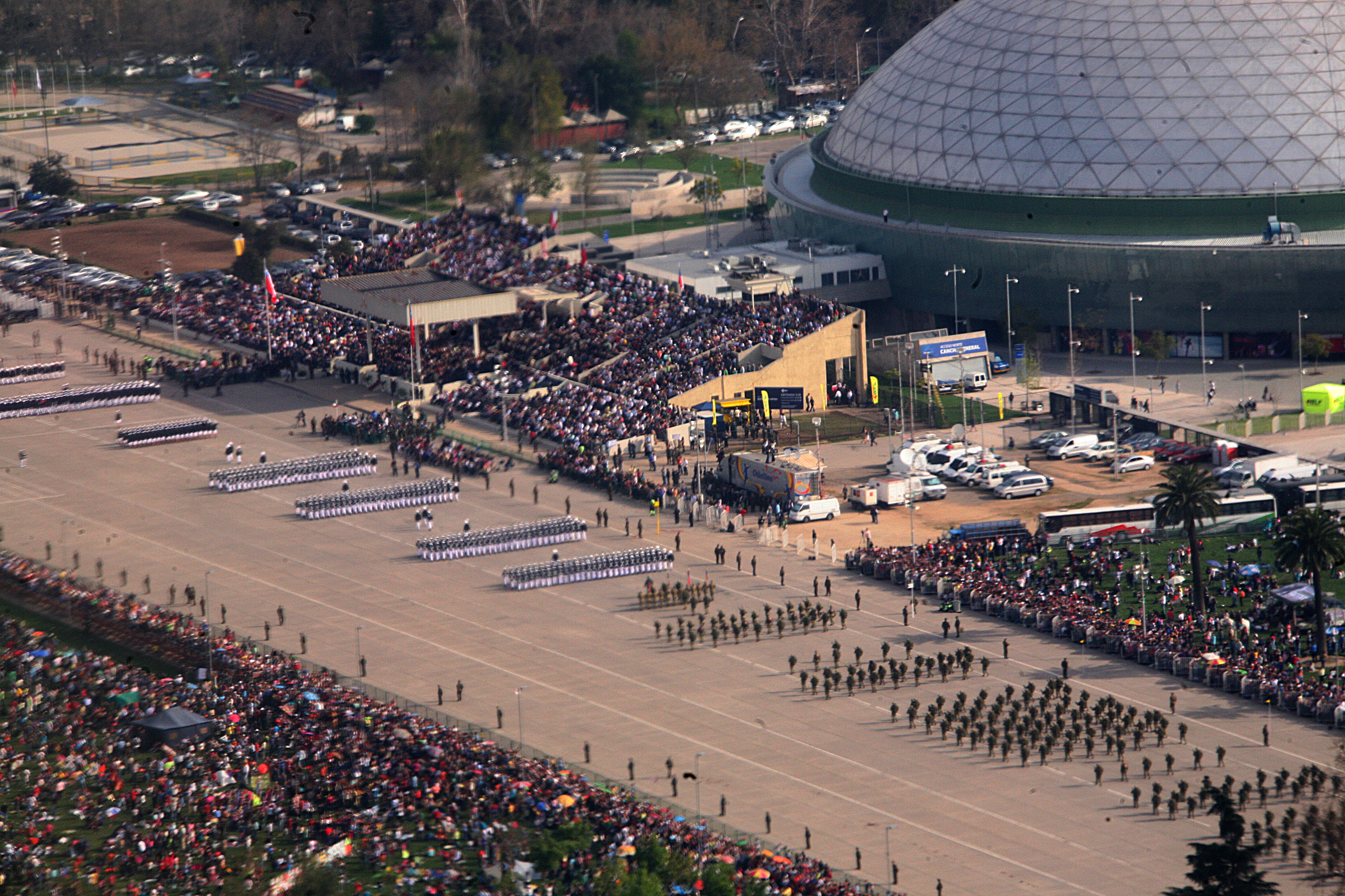 fotos año 2009